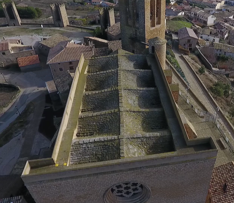 Tejado Invertido de la Iglesia-Fortaleza de San Saturnino (único en el mundo), del siglo XIII (visitable).